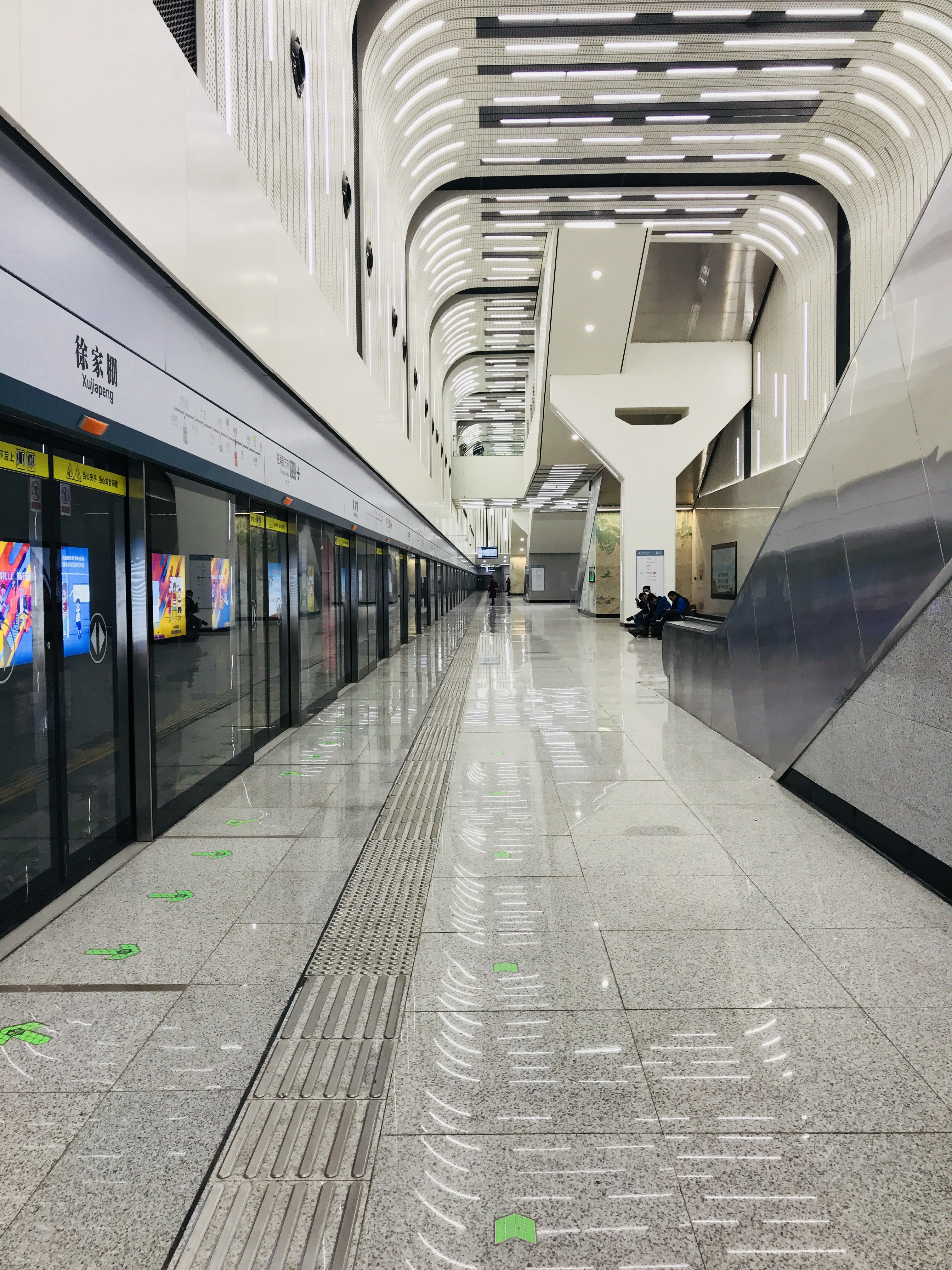 武汉轨道交通8号线徐家棚站月台